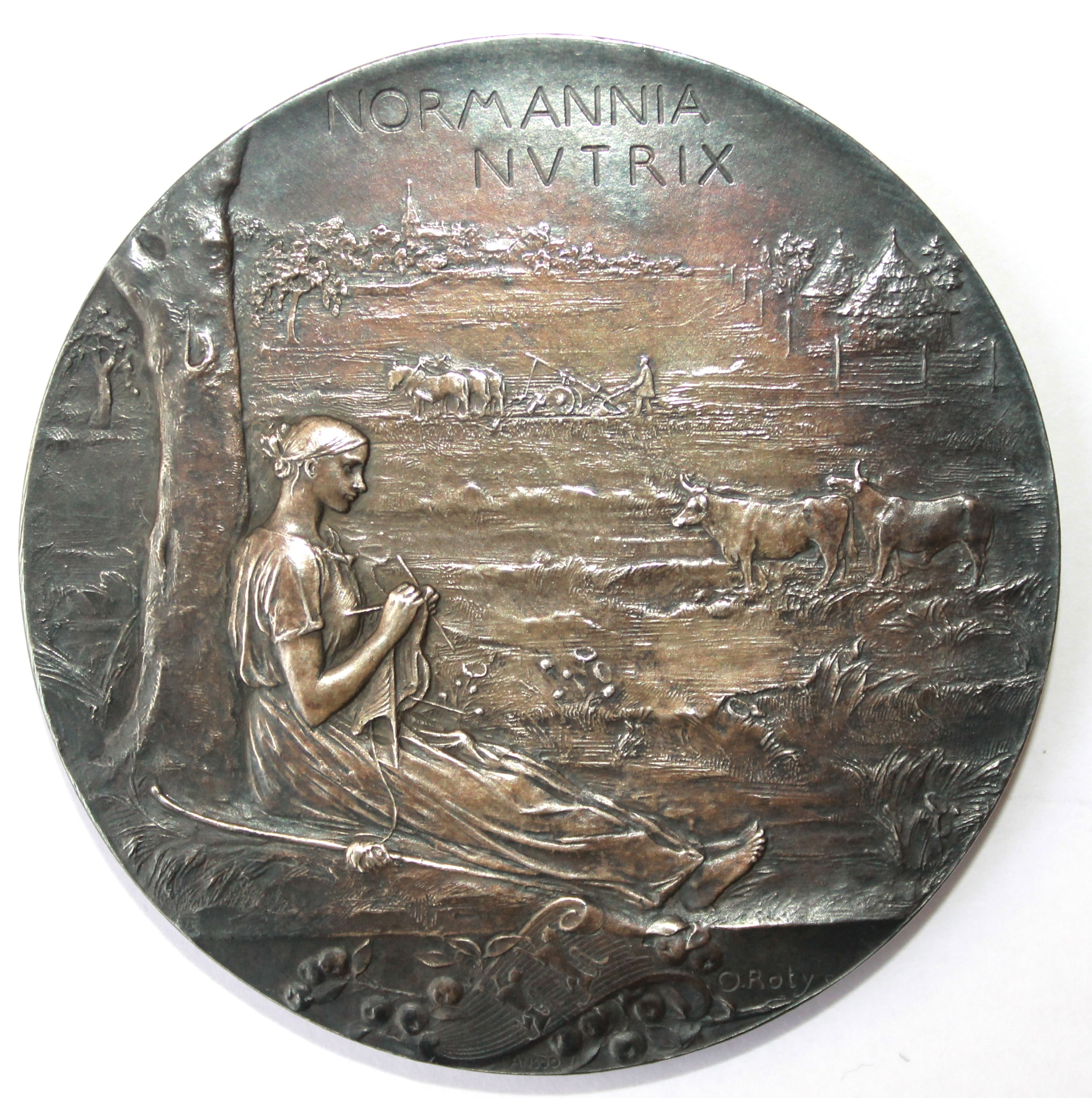 Médaille de l'Exposition nationale et coloniale de Rouen en 1896 par Oscar Roty. Avers: NORMANNIA NVTRIX